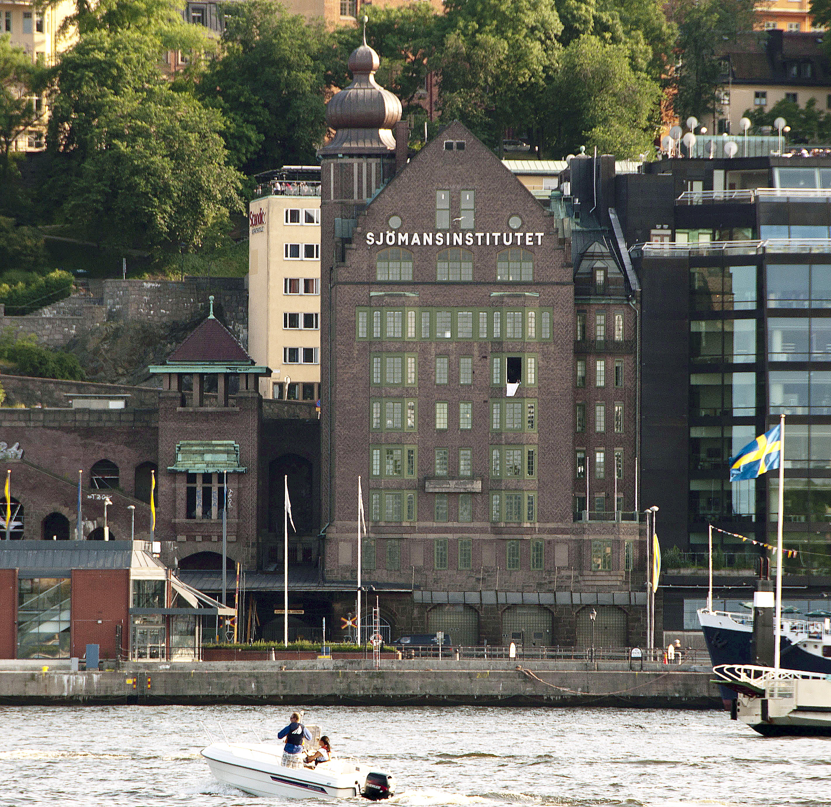 Sjömansinstitutet sett från Skeppsholmen